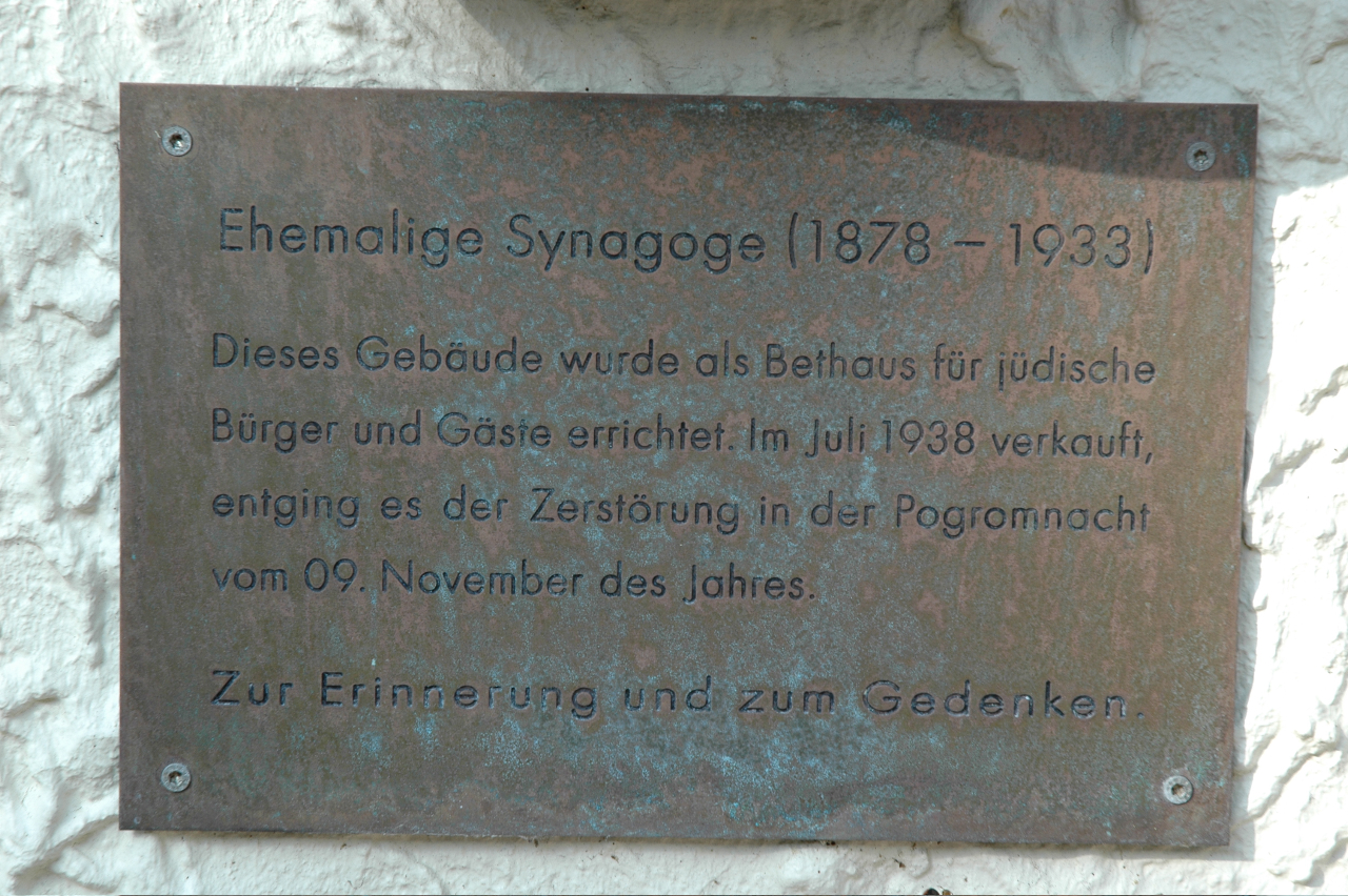 Gedenkplakette ehemalige Synagoge Norderney, Schmiedestraße 6